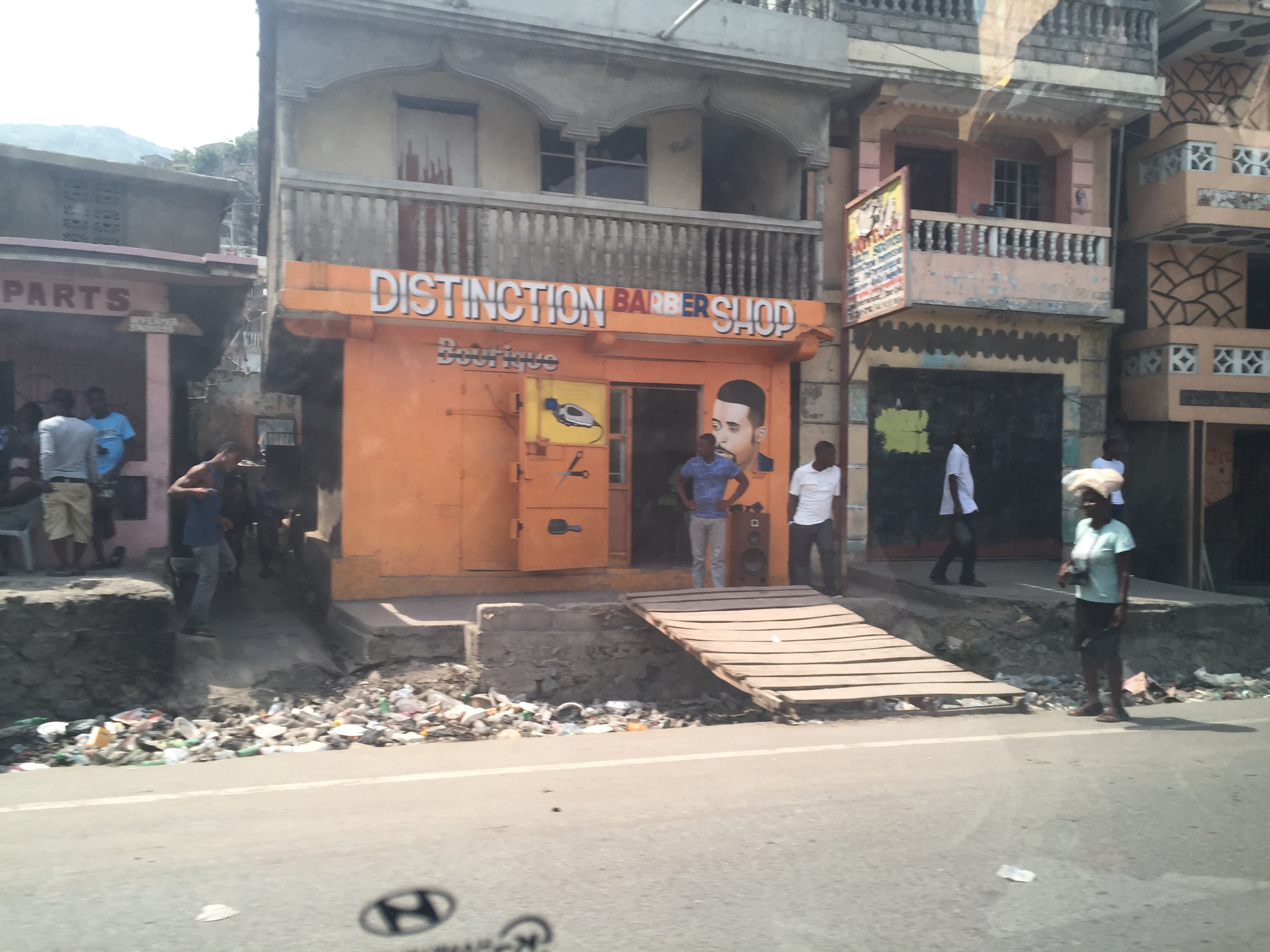 Goyard, Cap-Haitien, Haiti